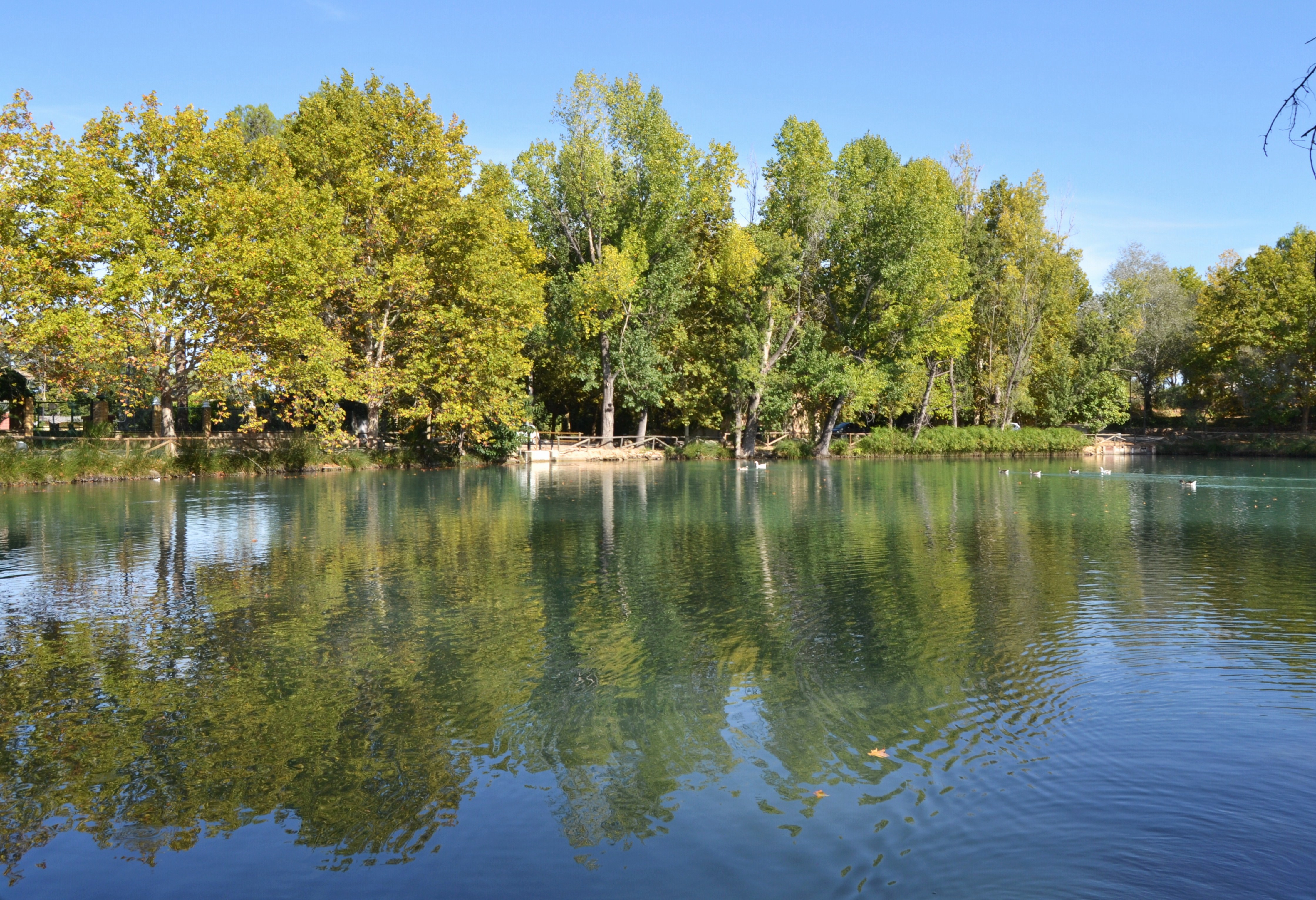 Albufera d'Anna, arbres.